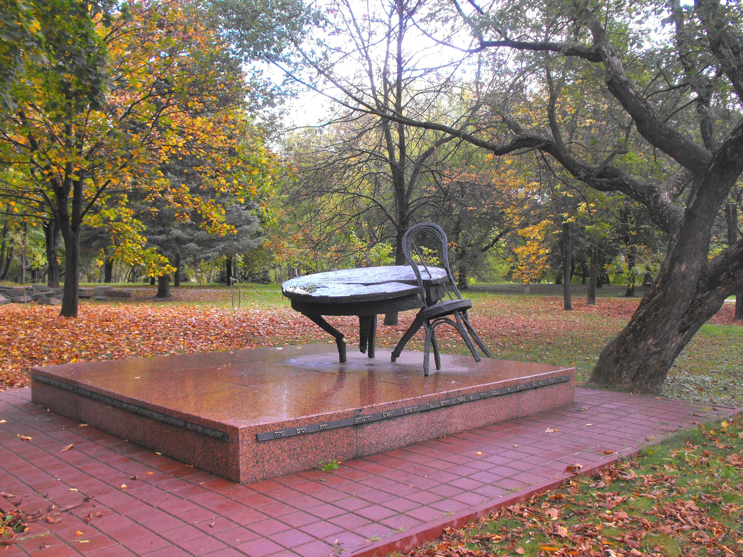 Памятник евреям - узникам Минского гетто, убитым нацистами на территории еврейского кладбища на улице Коллекторная - до перекрестка с улицей Сухая. Разломанный стол и стул - символ разрушенных и уничтоженных еврейских семей.